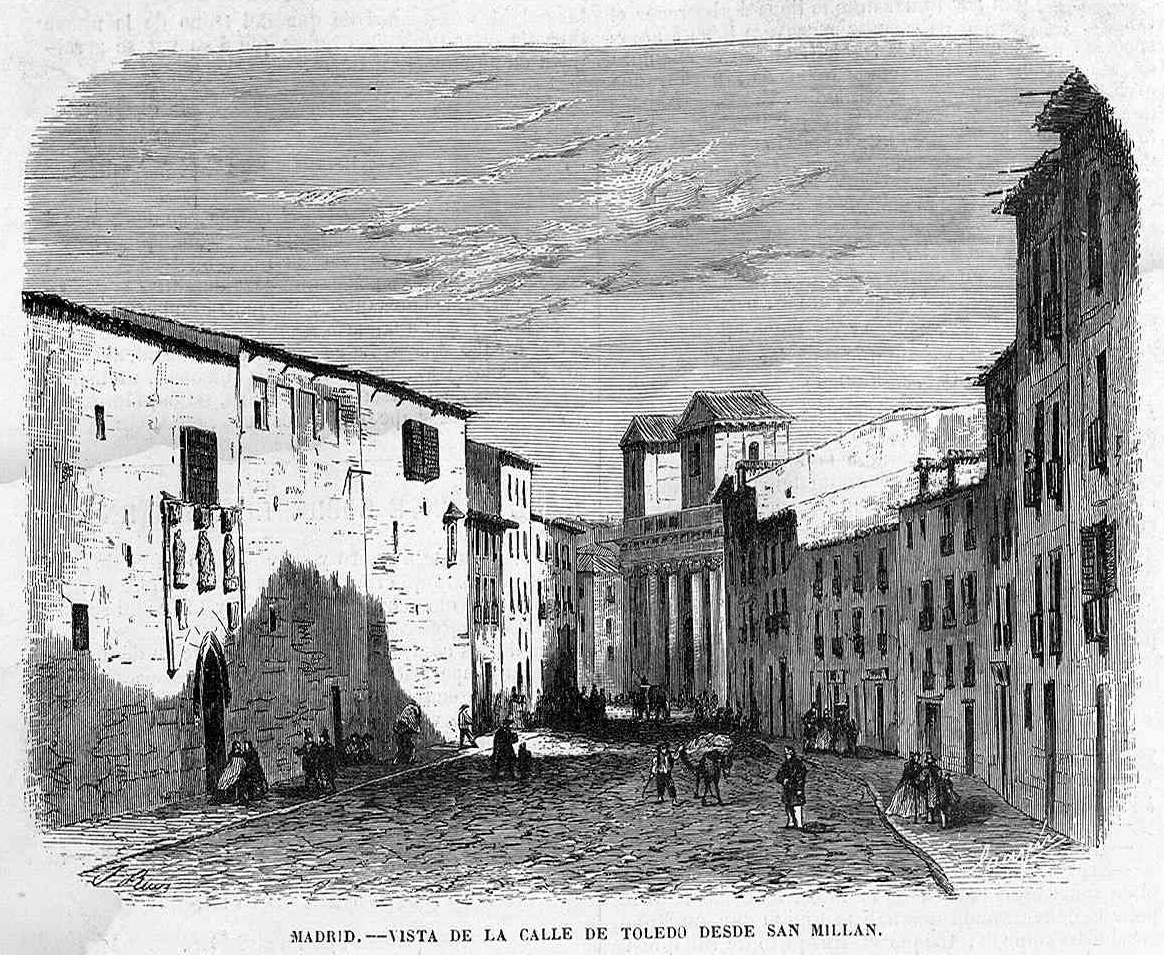 «Madrid, vista de la calle de Toledo desde San Millán», en la revista española El Museo Universal.